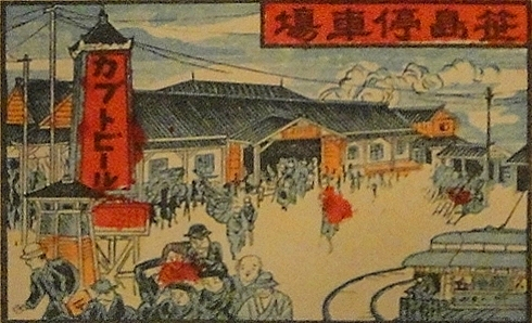 大正3年版金城名古屋名所図より笹島停車場